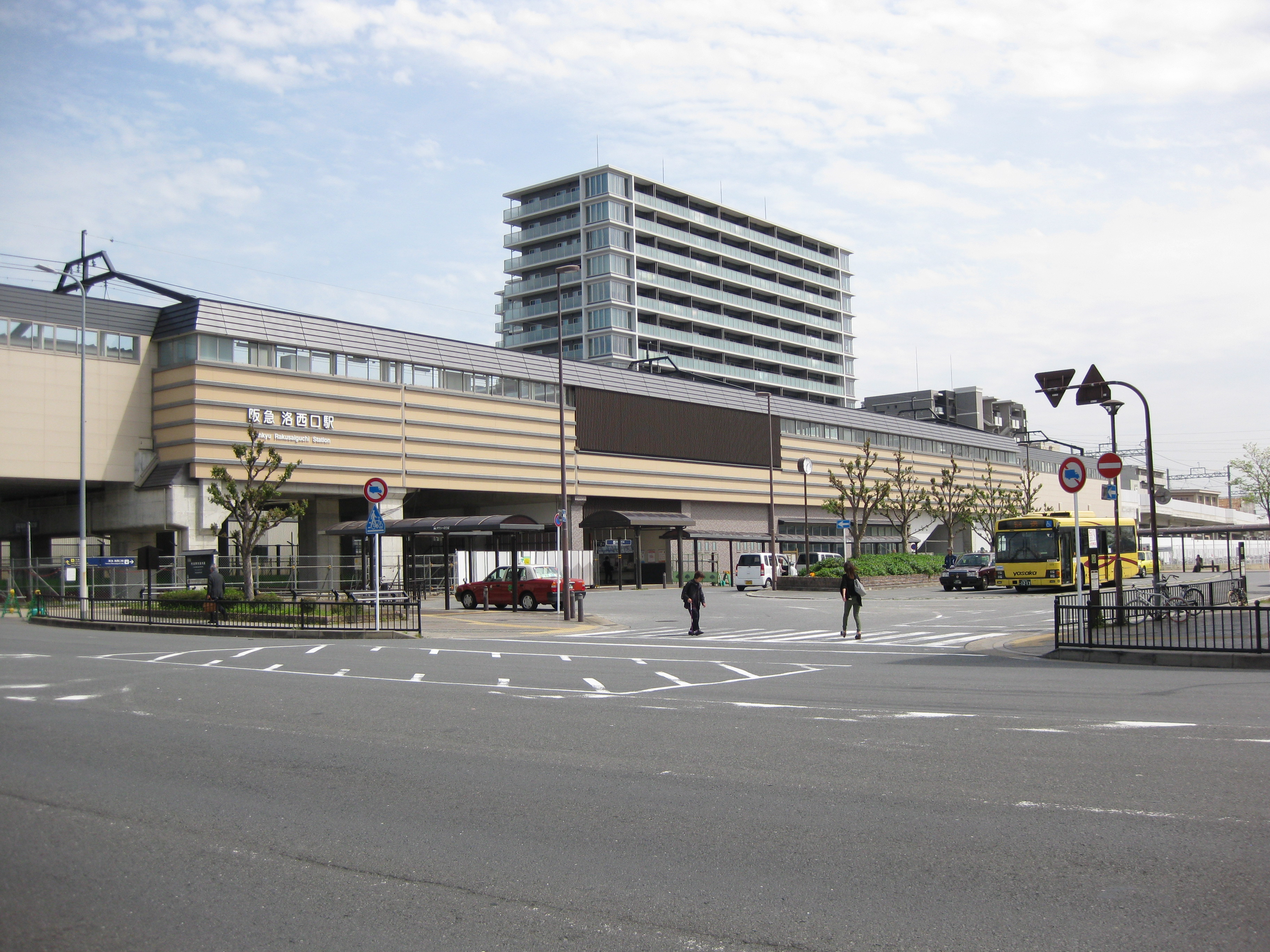 高架化工事完了後のja:洛西口駅